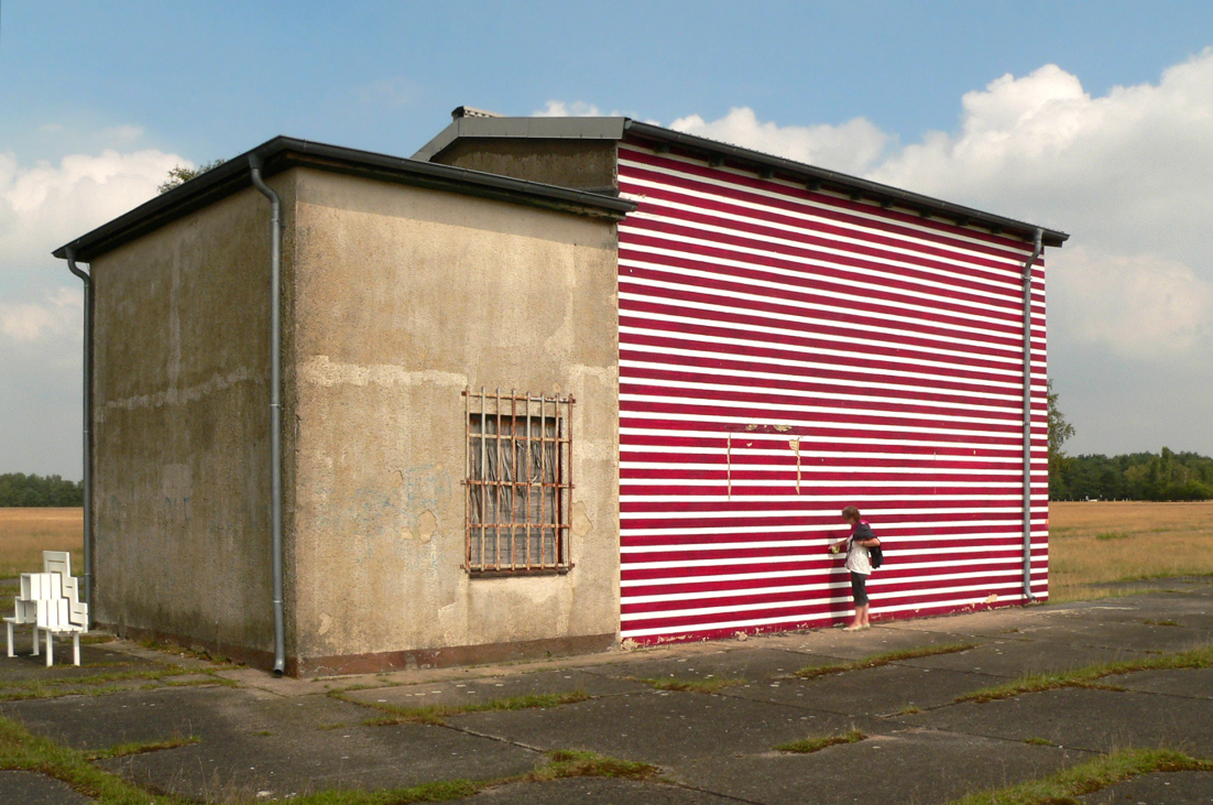 Transformatorenhaus auf Freifläche Camp Reinsehlen